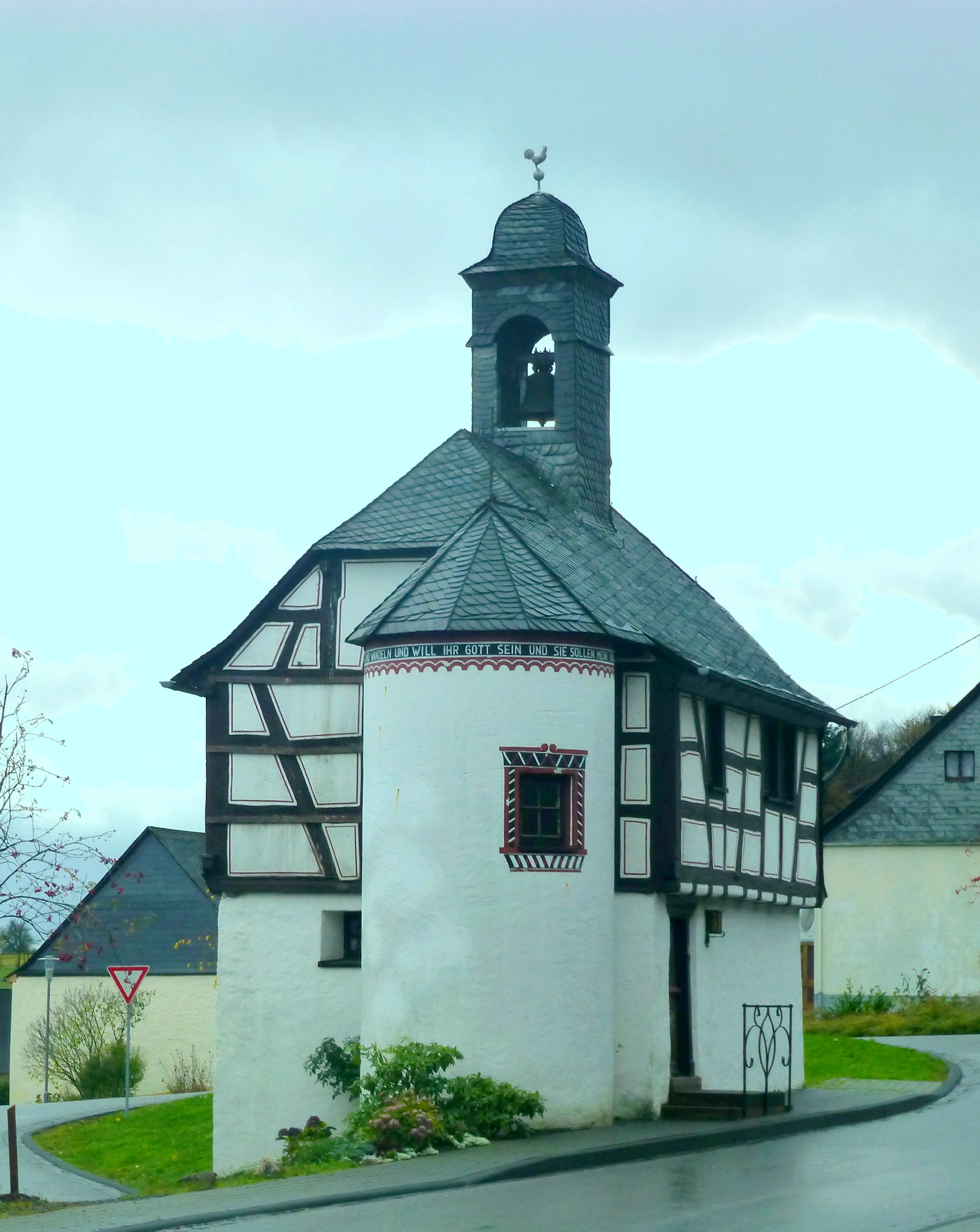 Hattgenstein – das Glockenhaus wurde 1762 erbaut